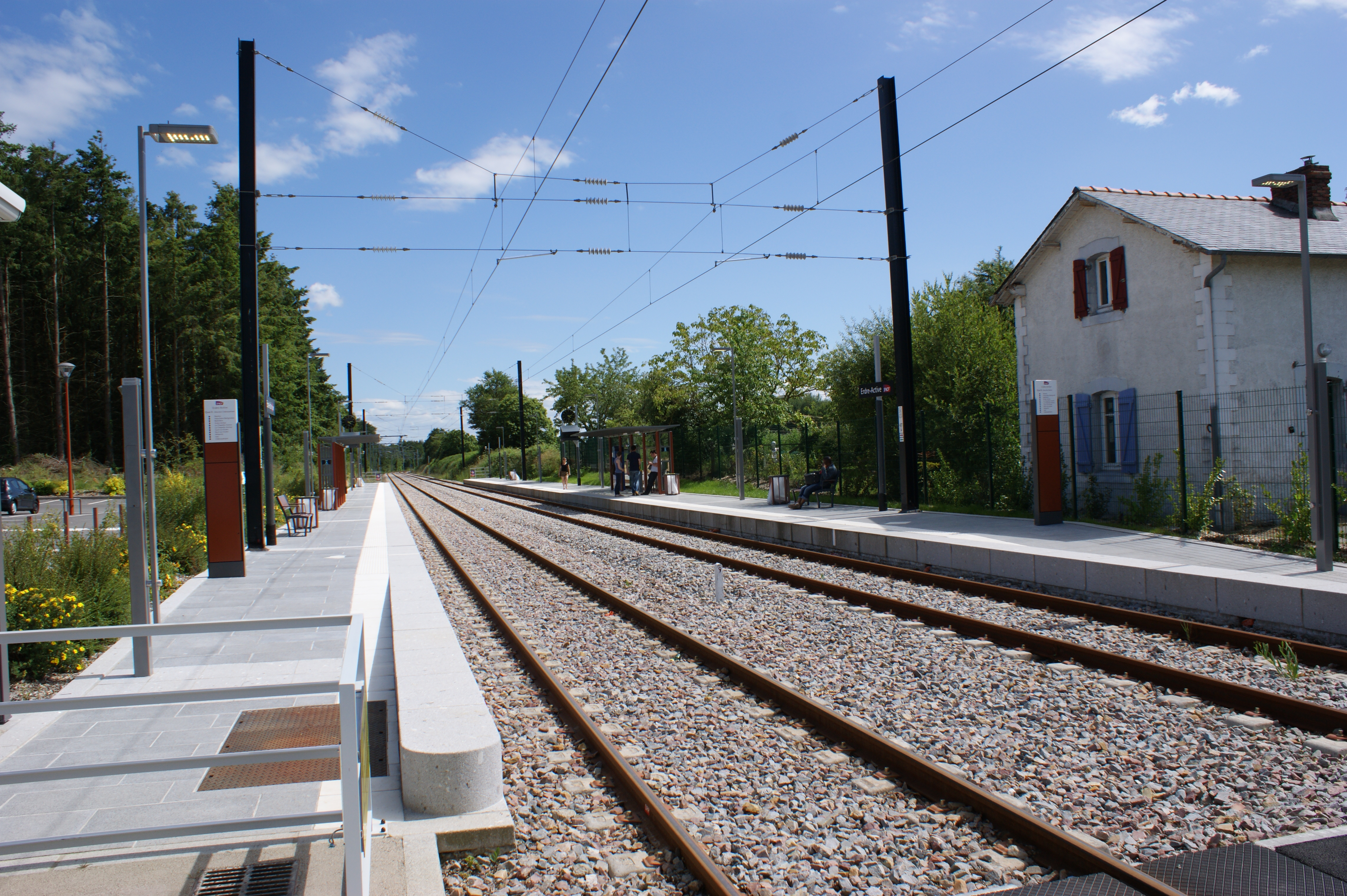 Gare d'Erdre-Active, vue en direction de Nantes depuis le passage à niveau planchéié pour les piétons.